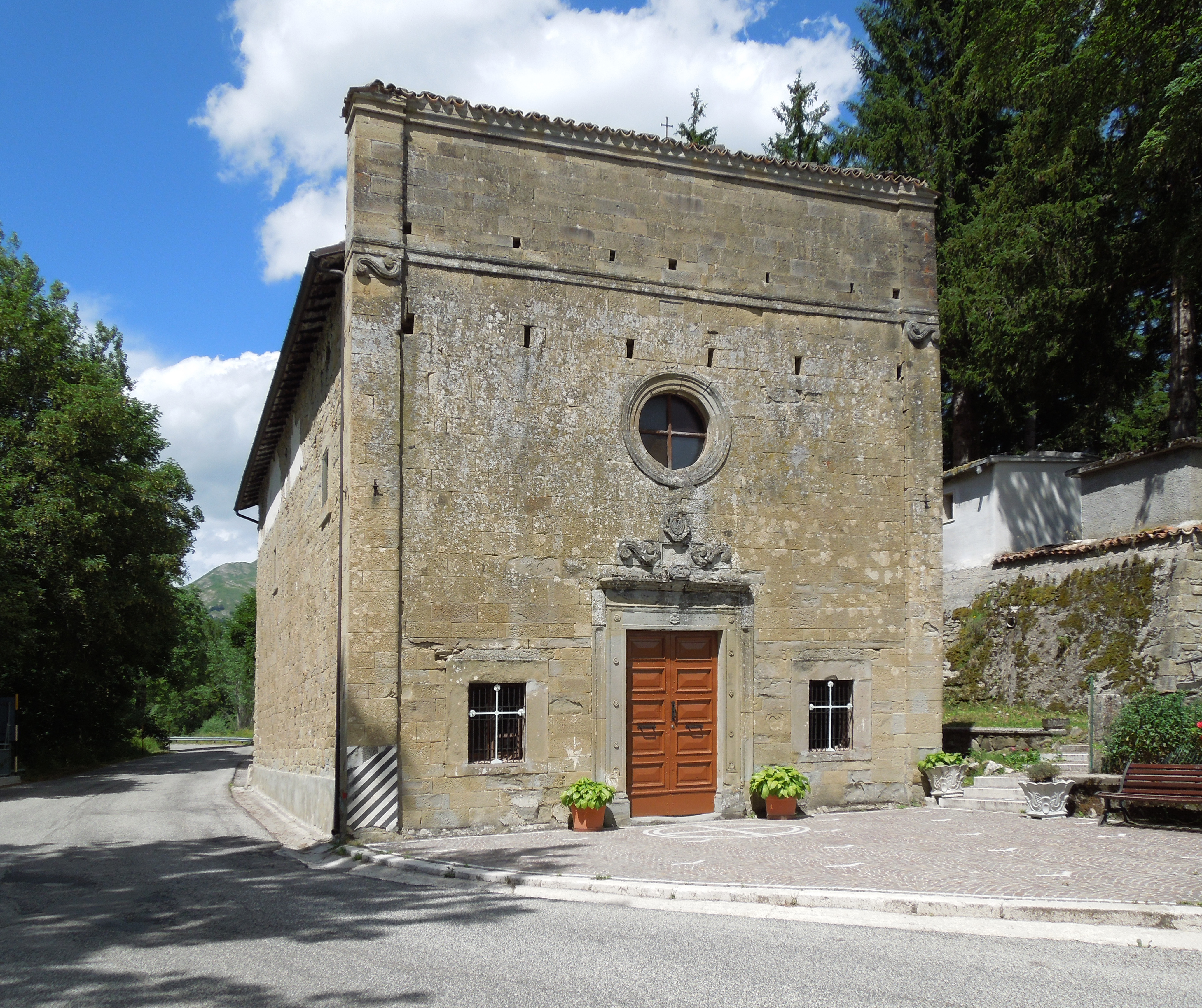 Facciata del Santuario della Madonna Apparente presso Campotosto in provincia dell'Aquila - Luglio 2016